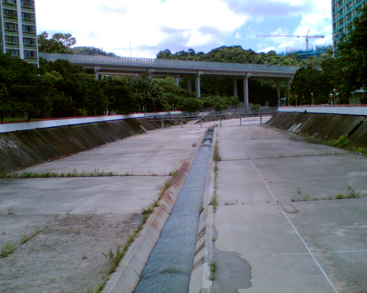 城門河上游近美林邨